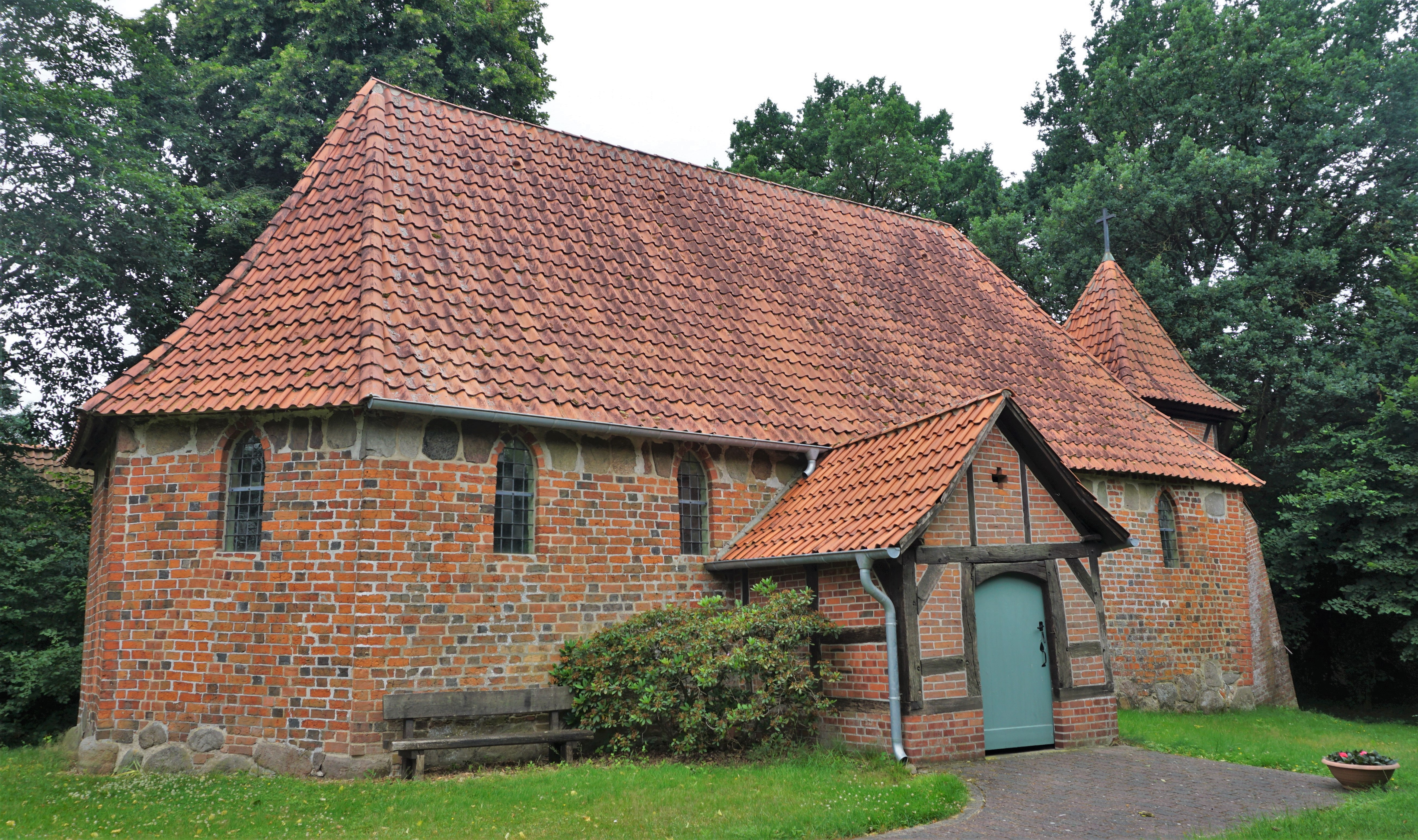 Blick von Nordosten auf die Burgkapelle in Gollern im niedersächsischen Landkreis Uelzen.